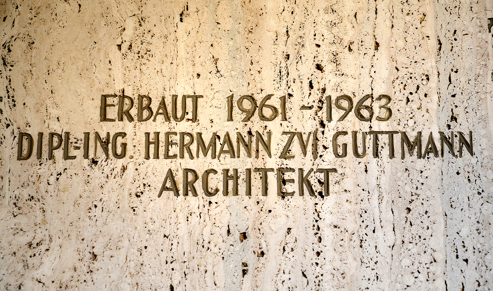 Inschrift in einer der Muschelkalkplatten rechts des Einganges der Synagoge in der Haeckelstraße der Jüdischen Gemeinde Hannover: „Erbaut 1961 - 1963 / Dipl.-Ing. Hermann Zvi Guttmann / Architekt“ ...